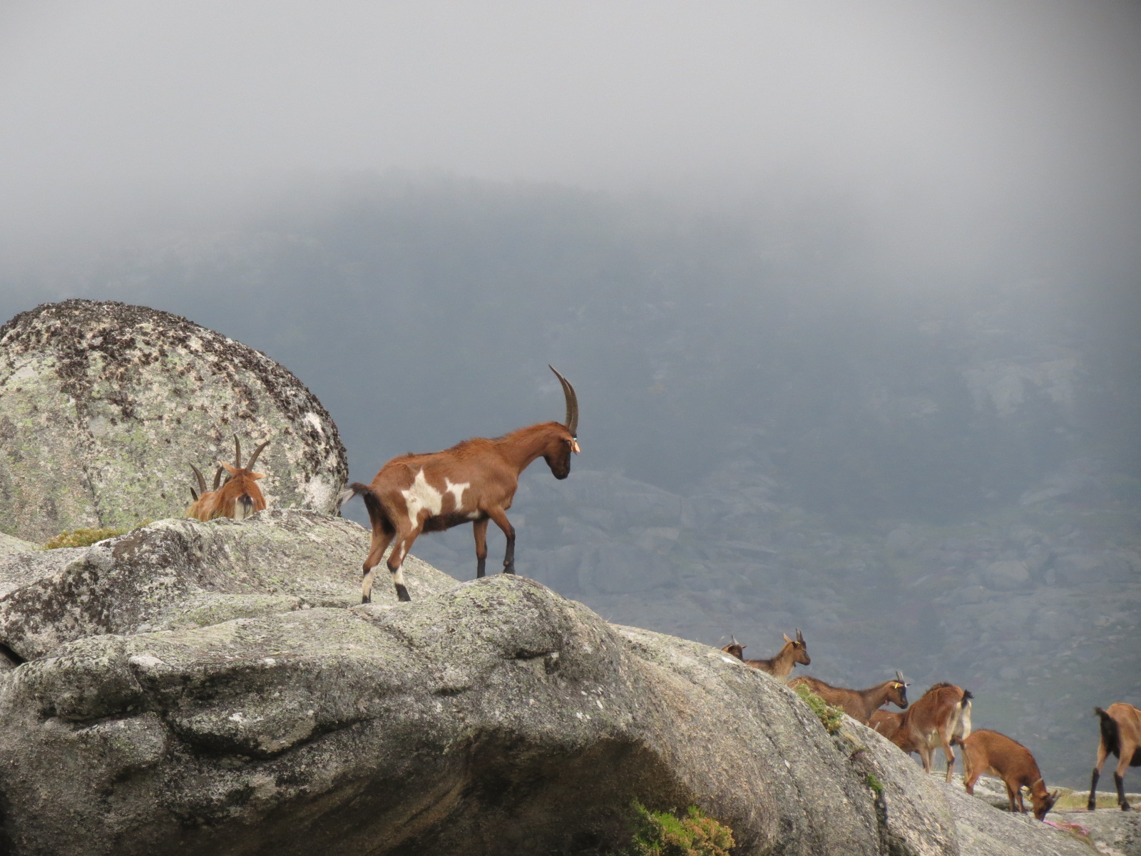 Cabras na serra do Alvão, Vila Real This is a photography of a Site of Community Importance in Portugal with the ID: PTCON0003. Natura2000 entry, EEA entry